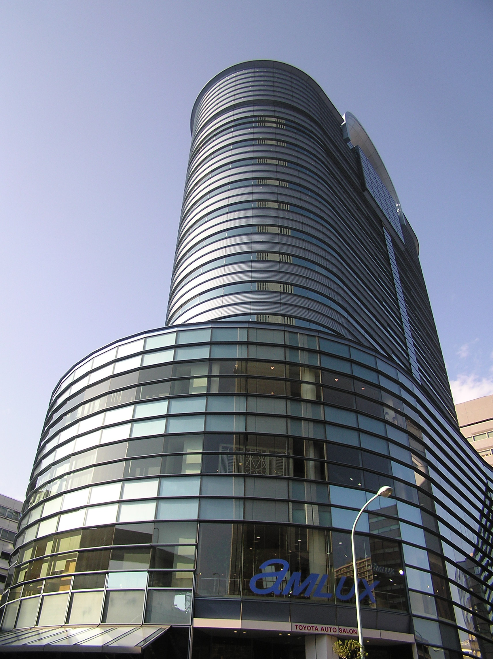 Amlux Tokyo Toyota